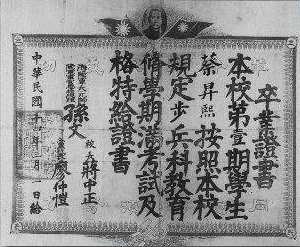 1925年3月1日黃埔軍校第一期步兵科蔡升熙畢業證